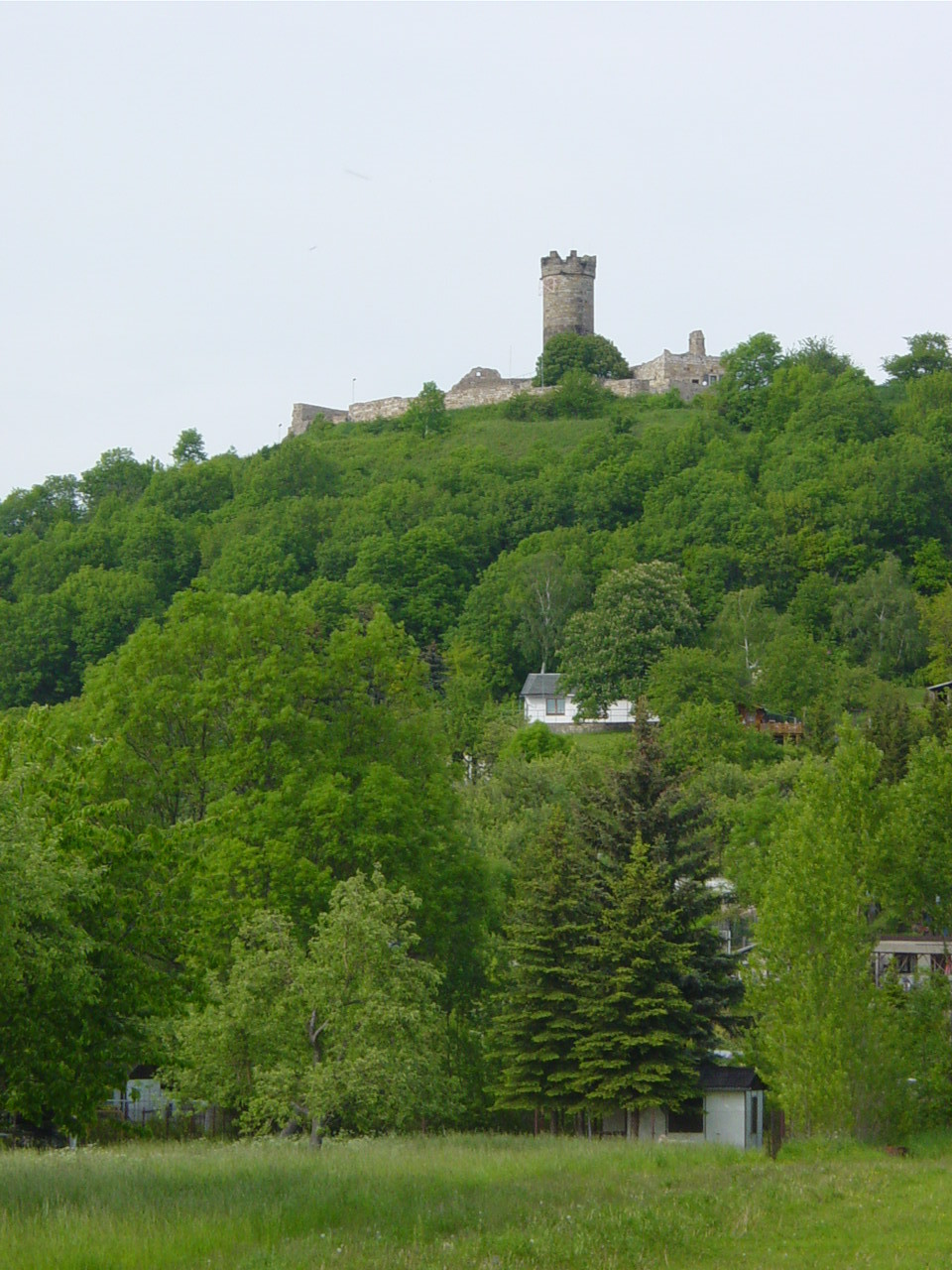 Ruine der Mühlburg bei Mühlberg (Thüringen)